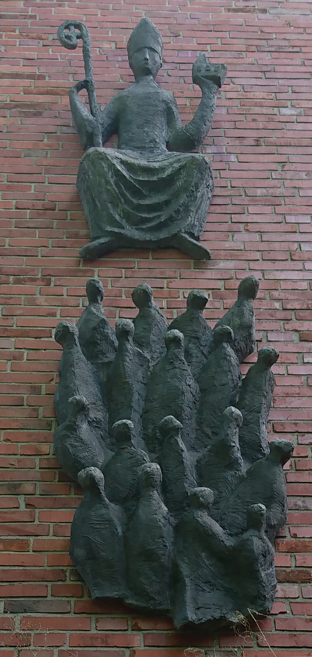 St. Ansgar mit Gemeinde am Gemeindehaus (am 4. November 1962 nach zwei Jahren Bauzeit eingeweiht. Quelle) der Ansgarkirche in Hamburg-Langenhorn, Wördenmoorweg 22, von Karl Heinz Engelin.